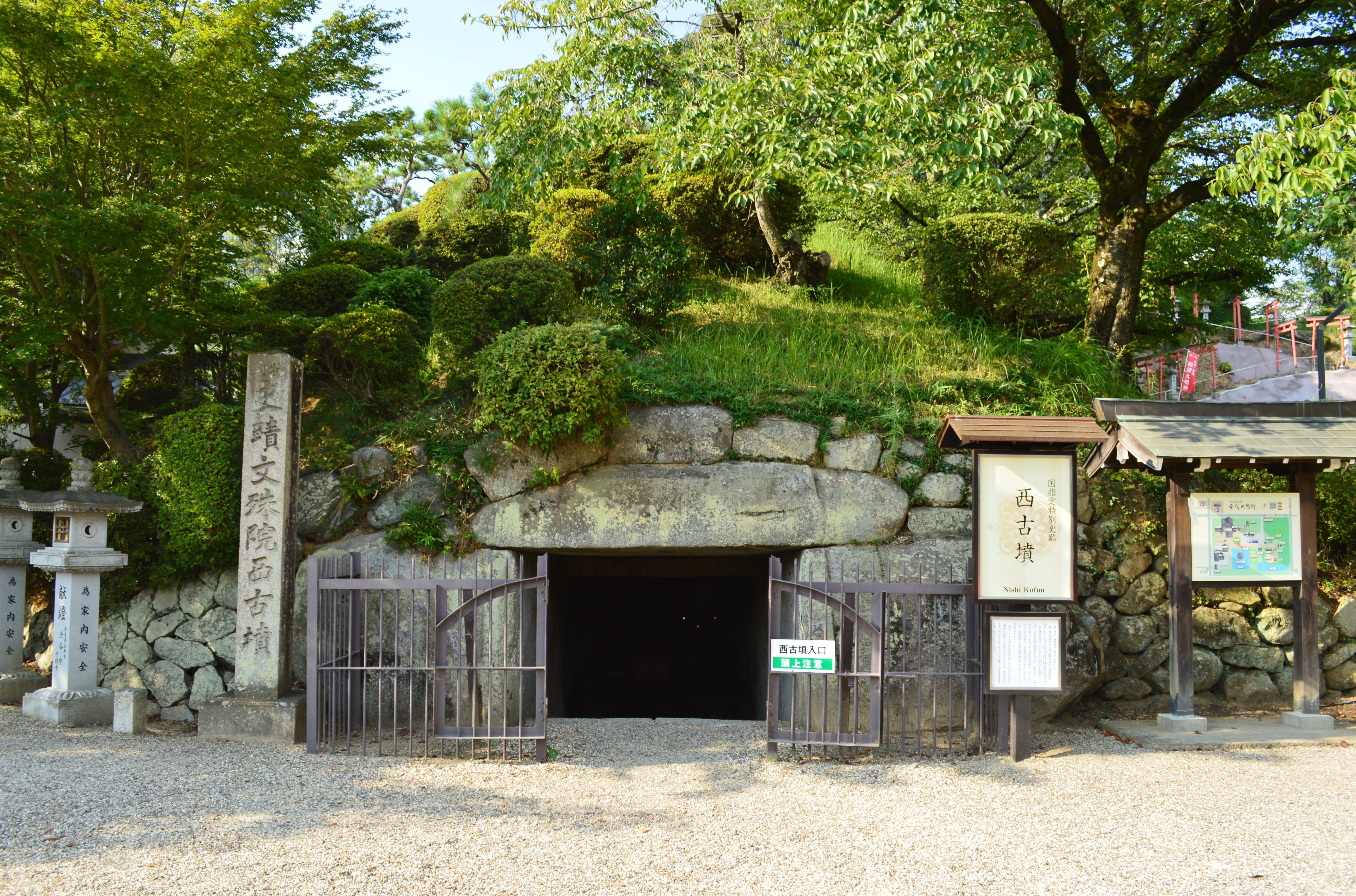 文殊院西古墳 石室入り口